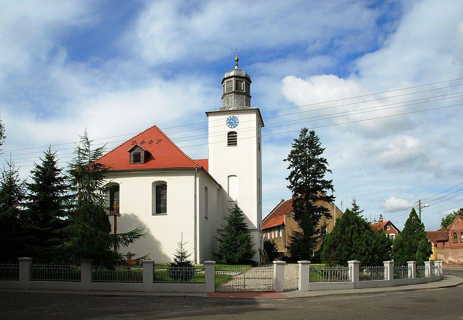 Kościół pw. św. Jana Chrzciciela w Kolsku.